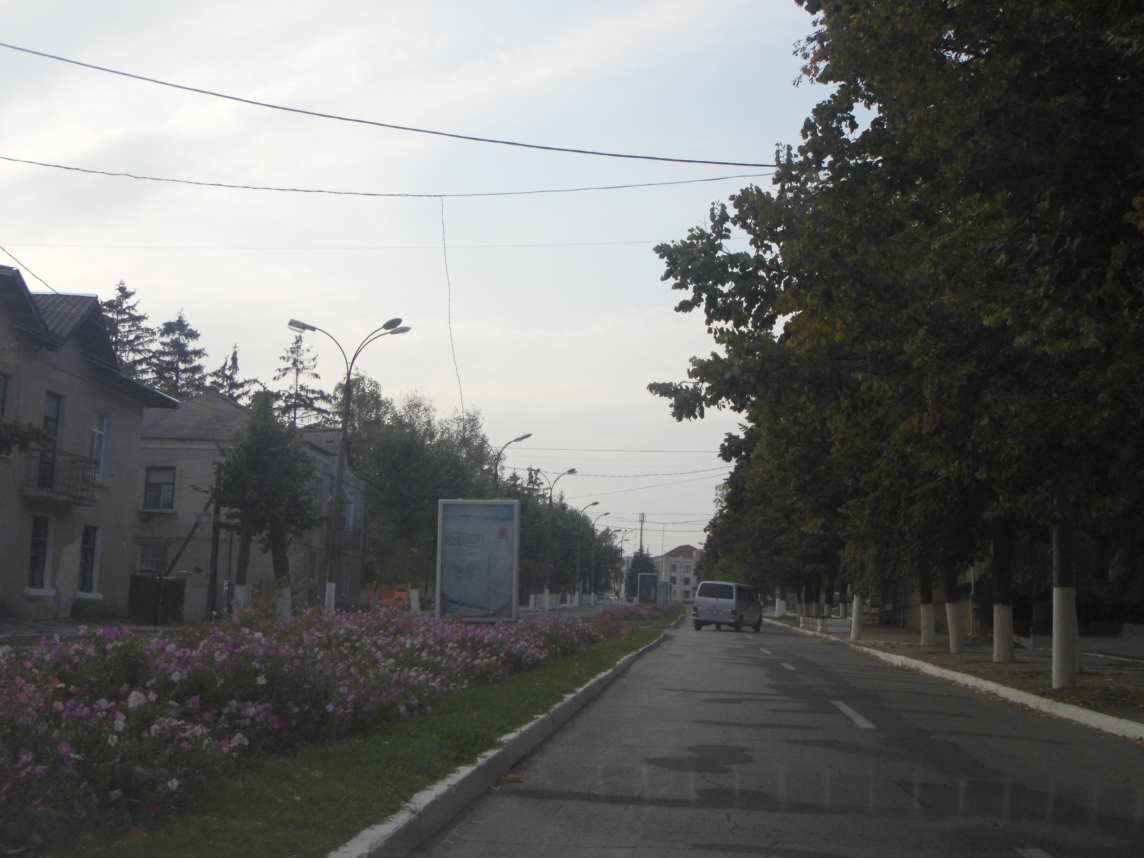 Улица Михалча Хынку в Хынчешты